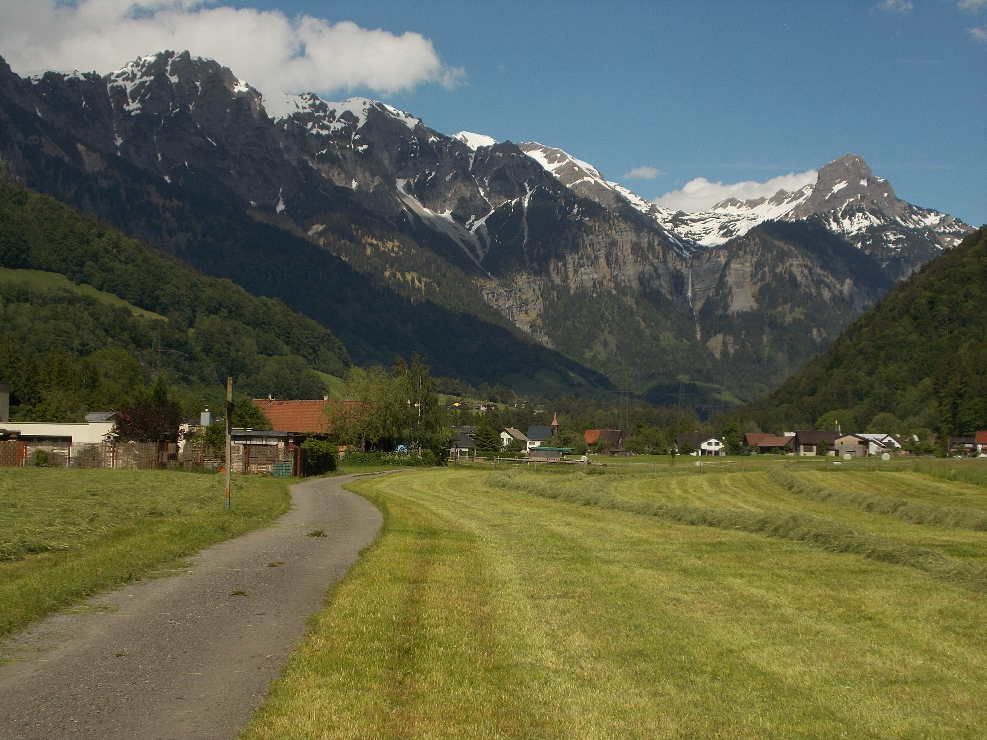 Stallehr von Westen mit dem Lechquellengebirge - der permanente Verkehrslärm raubt allerdings dem Dorf die Idylle.